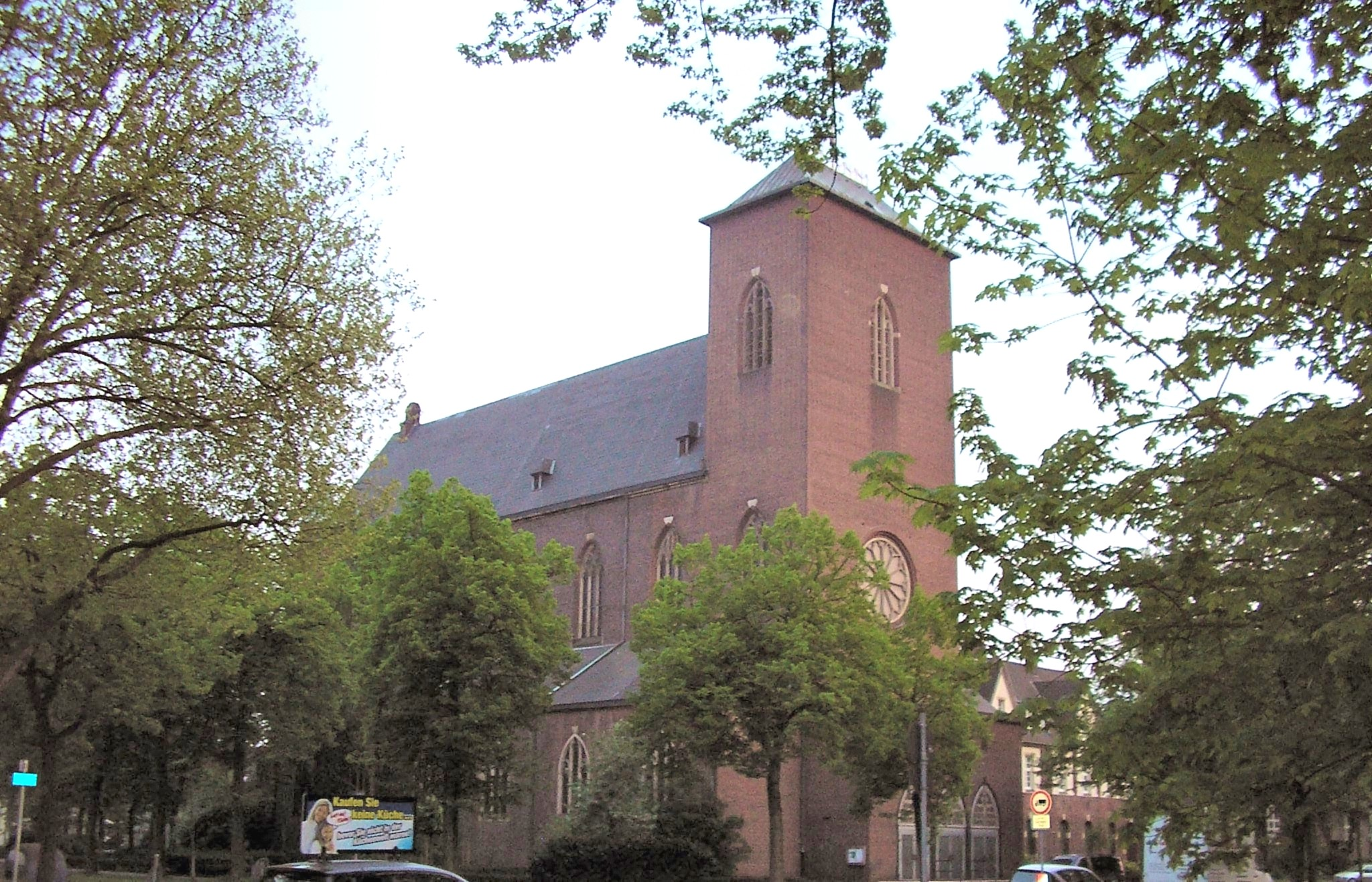 Church, St. Gabriel, Duisburg